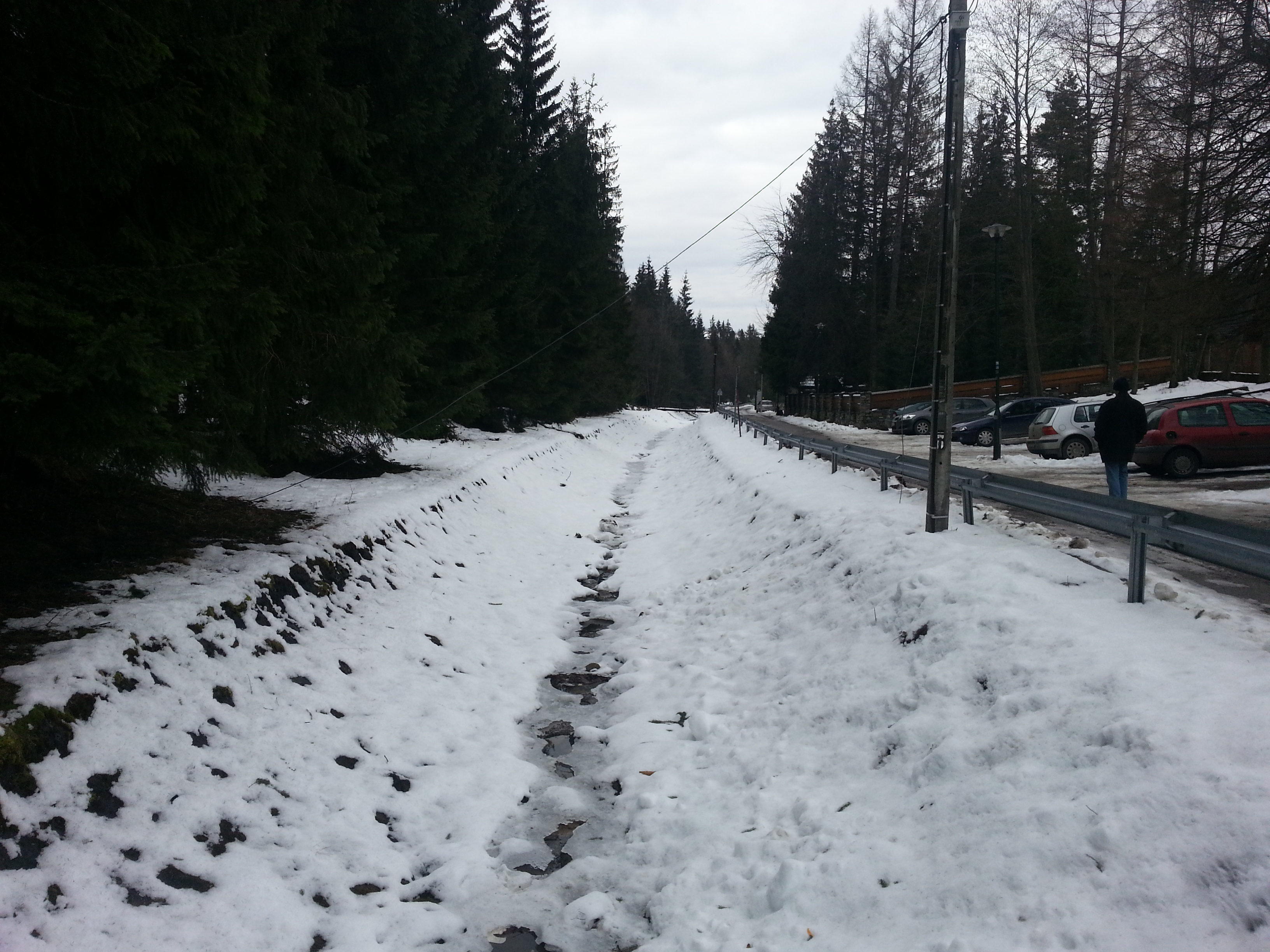 Rzeka Bystra przy Bulwarach Słowackiego